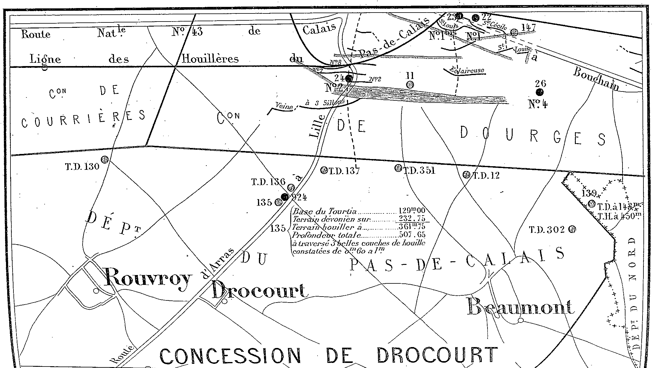 État des travaux de la Compagnie des mines de Drocourt vers 1880.